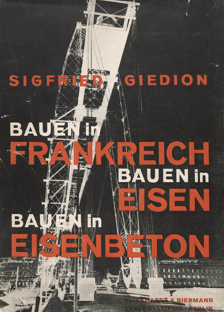 Sigfried Giedion - Bauen in Frankreich. Eisen. Eisenbeton, Leipzig, Berlin, Klinkhardt & Biermann, Zweite Auflage c. 1930. Schutzumschlag von László Moholy-Nagy